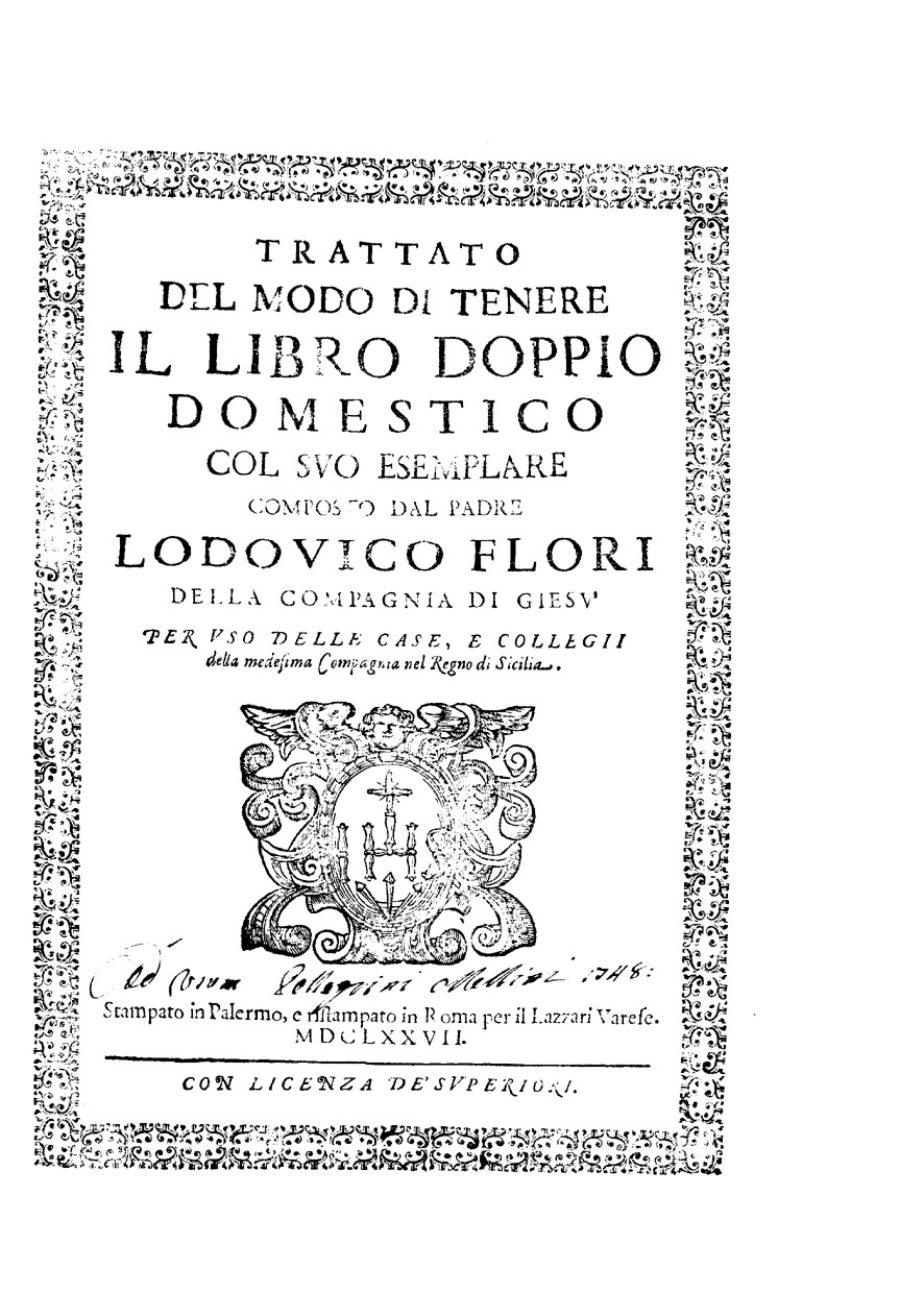 Trattato del modo di tenere il libro doppio domestico col suo esemplare composto dal padre Lodouico Flori della Compagnia di Giesu per vso delle case, e collegii della medesima Compagnia nel regno di Sicilia. - Stampato in Palermo e ristampato in Roma : per il Lazzari Varese, 1677. - 3 pt. ([4], 126, [2] p., [2] c. di tav.; [1], 32, [2] c.; 50, [4] c.) ; fol. .